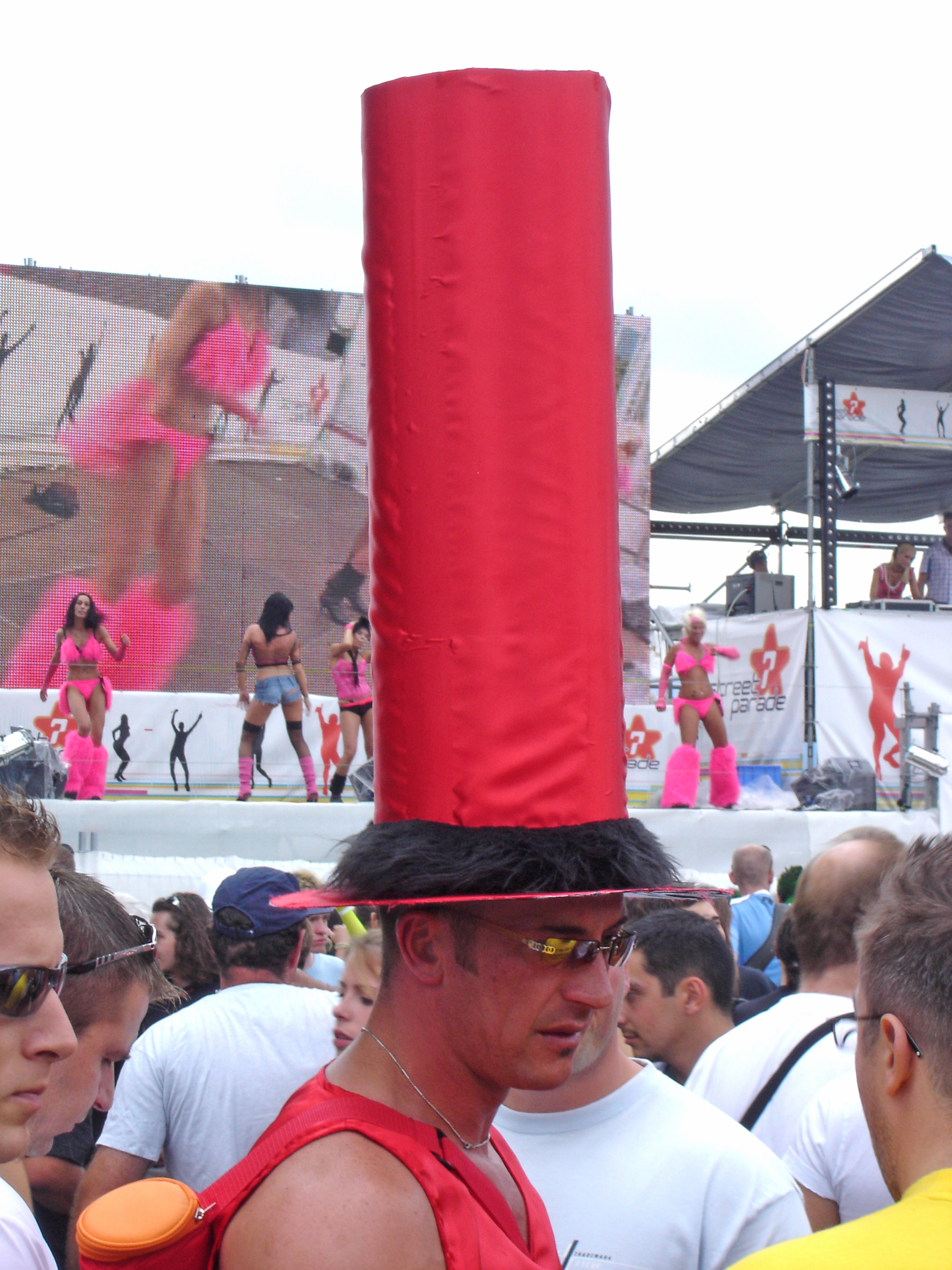 Zürich Street Parade 2005.